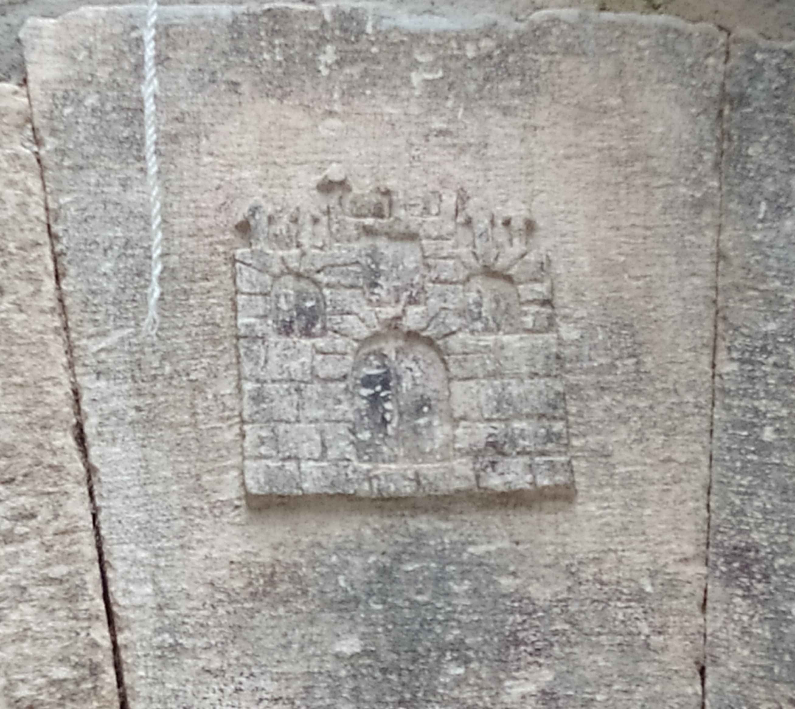 Escut de Casa Veciana